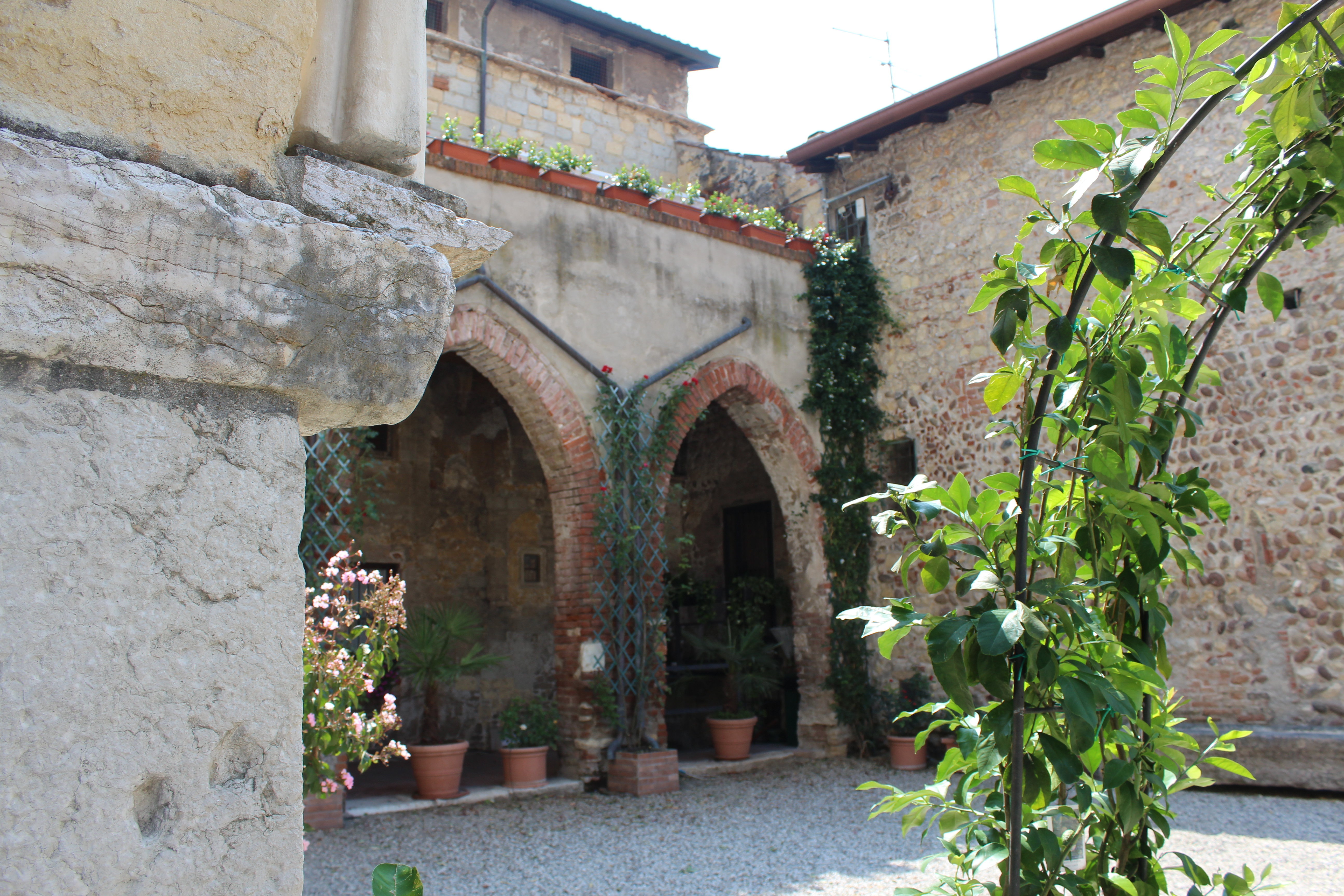 Chiesa di San Giovanni in Valle a Verona. Esterno.